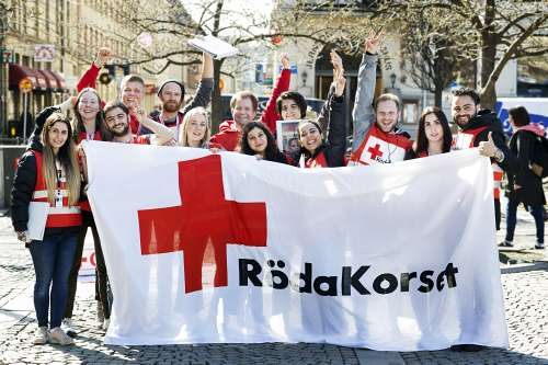 Röda Korsets generalsekreterare är med och värvar månadsgivare i Göteborg våren 2018.